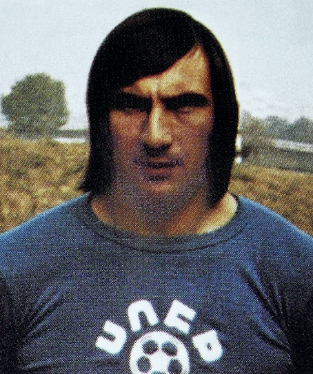 François Felix en 1975, 'Ageducatifs 1975 - 1976', Panini figurina n°20.